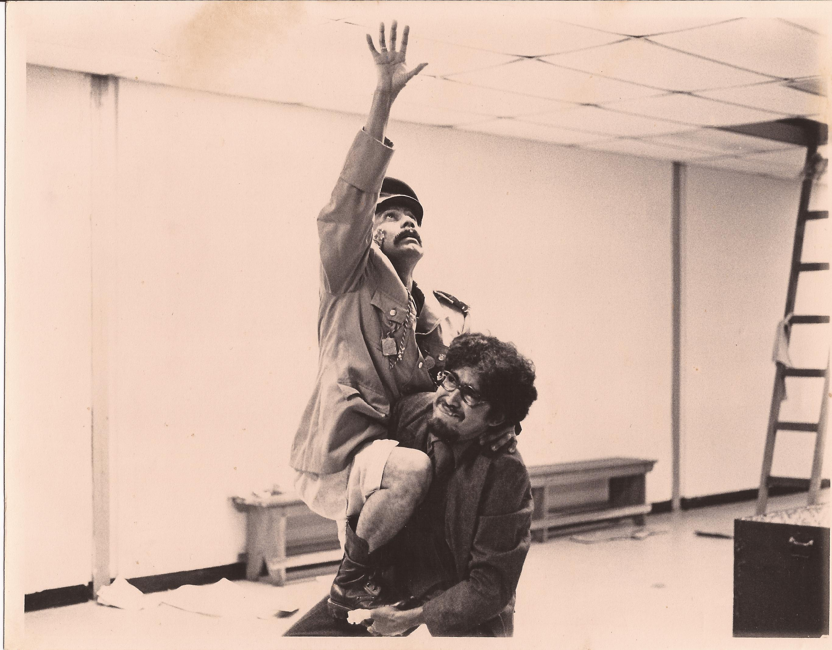 Obra de teatro de papá